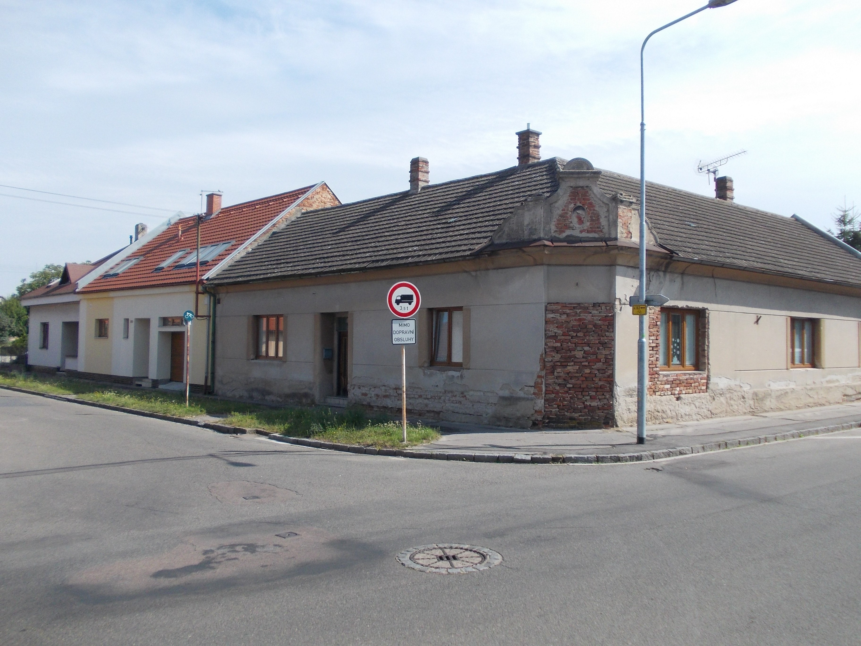 Nové Jesenčany - domy č.p. 1776, 2810 a 196